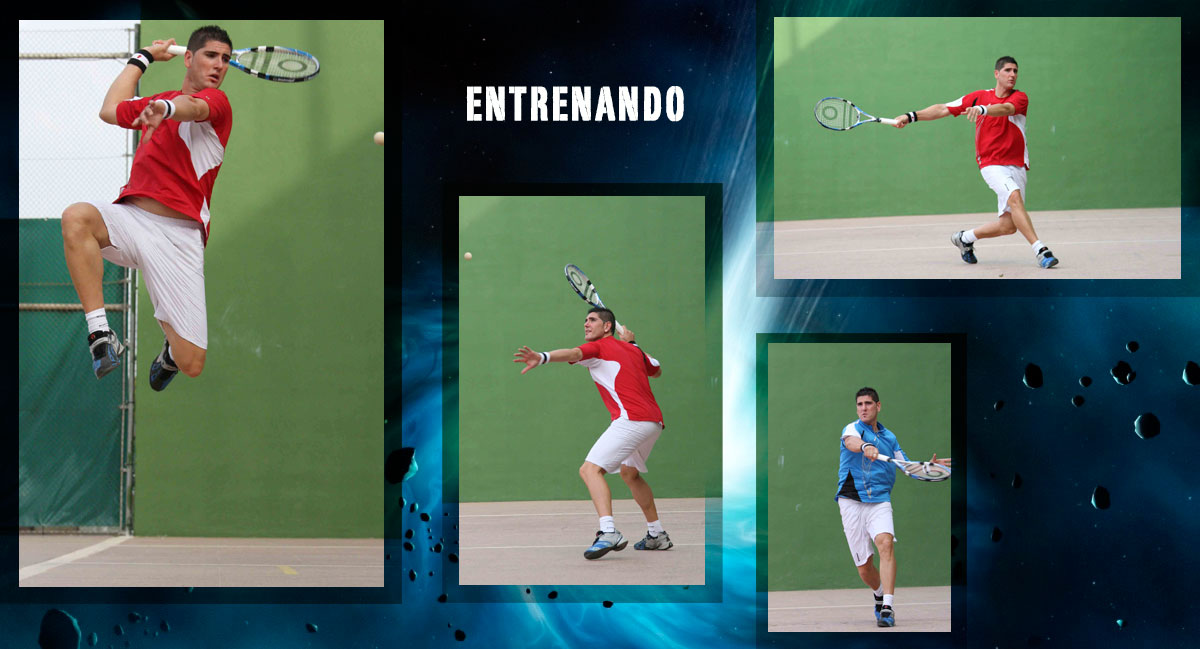 Frontenis olimpico